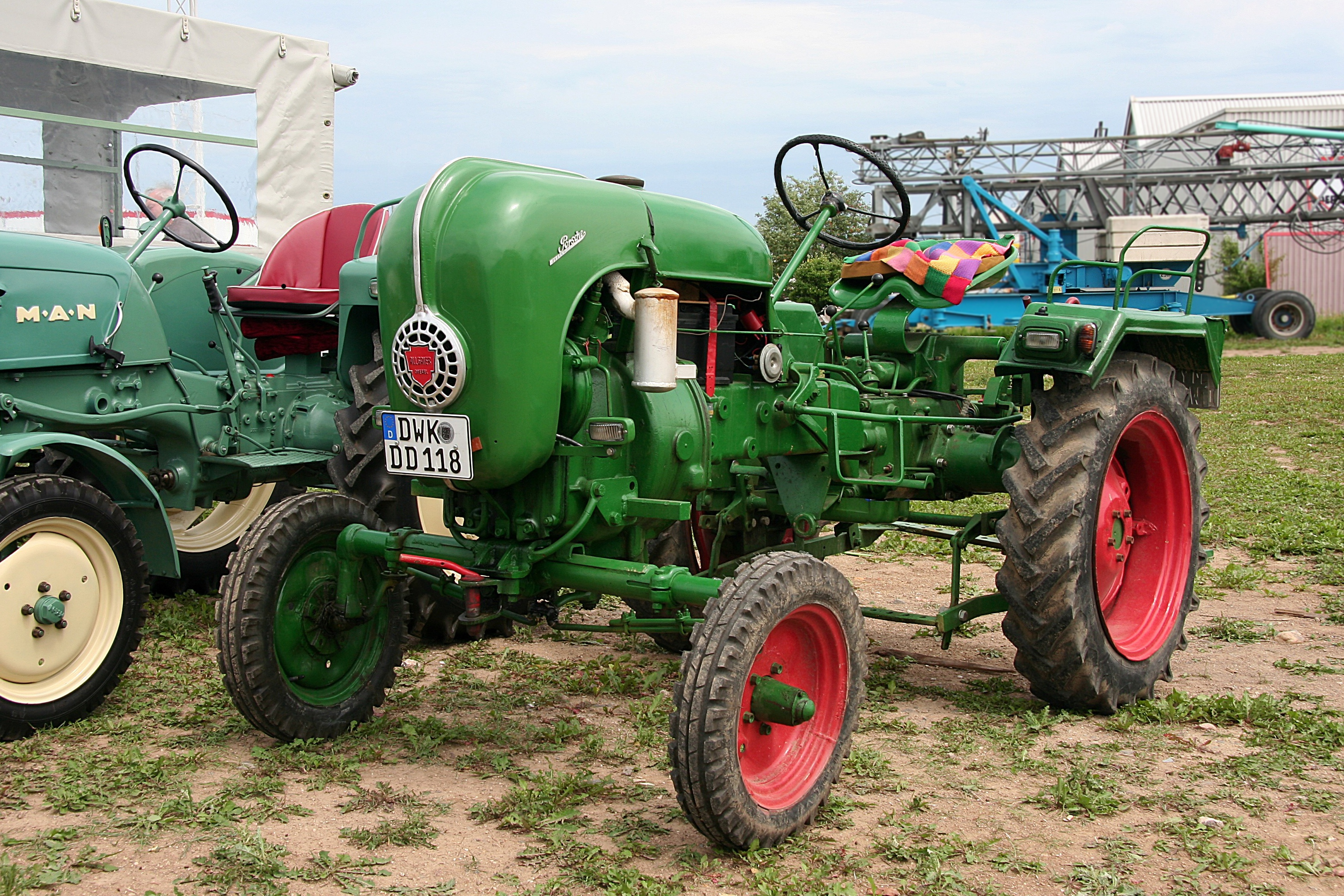 Allgaier A 111, 1-Zylinder-Dieselmotor, luftgekühlt, 822 cm³, 12 PS (8,8 kW), Baujahr 1953 (Bauzeit 1952 bis 1955, 1734 Stück), Konstruktion Porsche